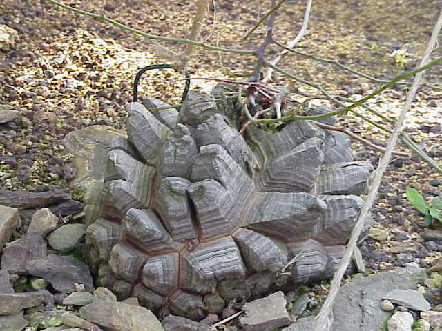 Species: Testudinaria elephantipes montana Family: Dioscoraceae Image No. 4